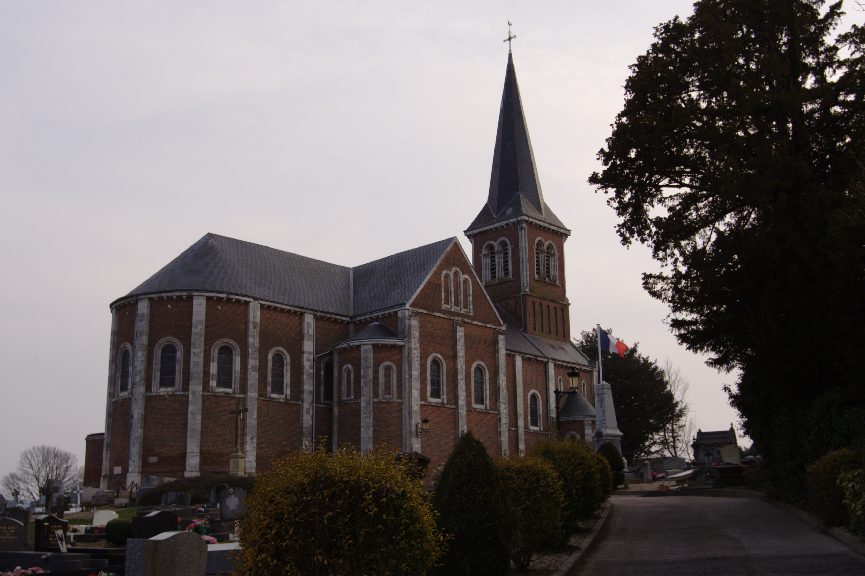 Église Saint-Aubin-des-Cercueils de Saint-Aubin-Routot.